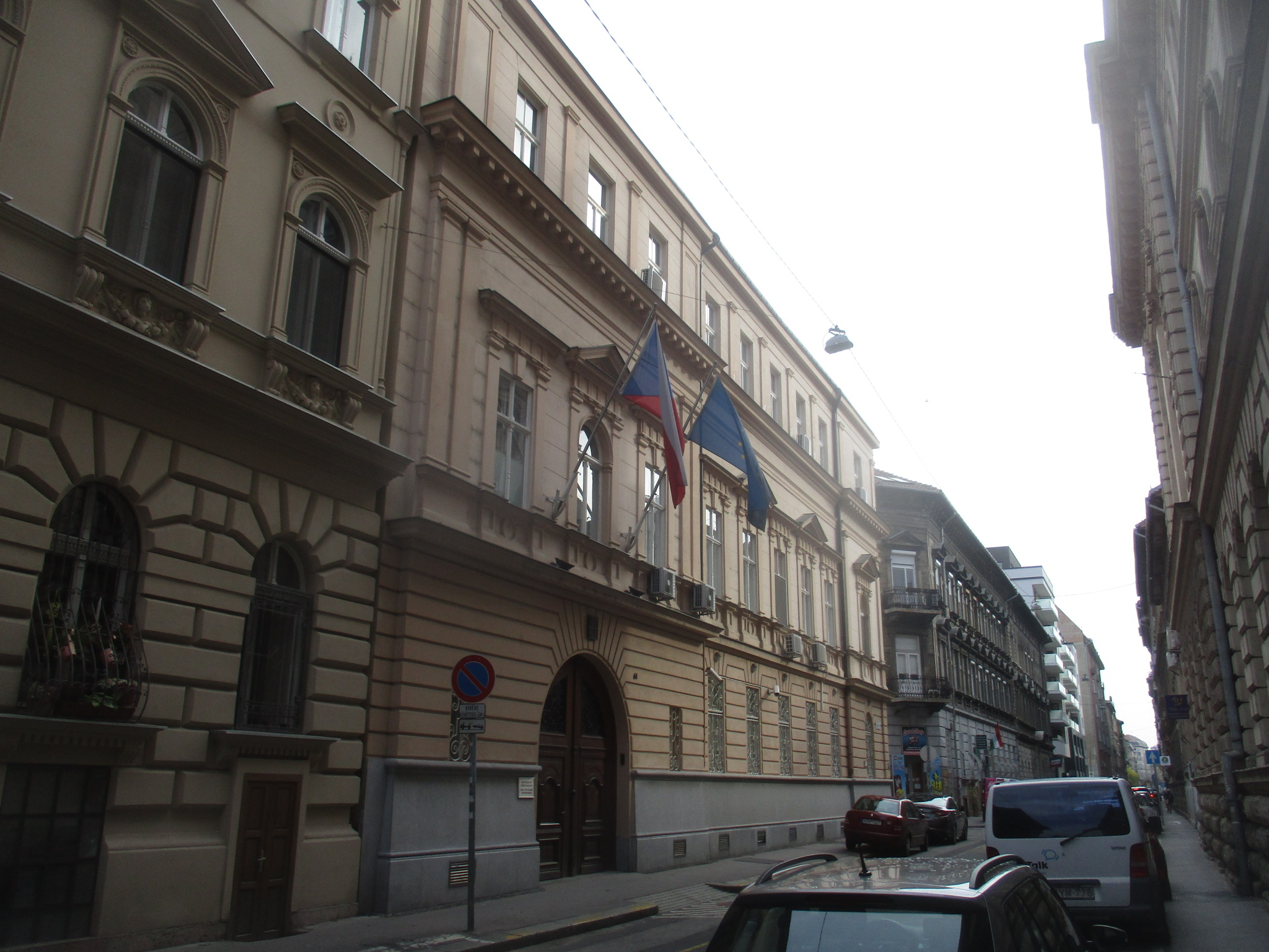 Csehország budapesti nagykövetsége (Budapest VI. Rózsa utca 61.)